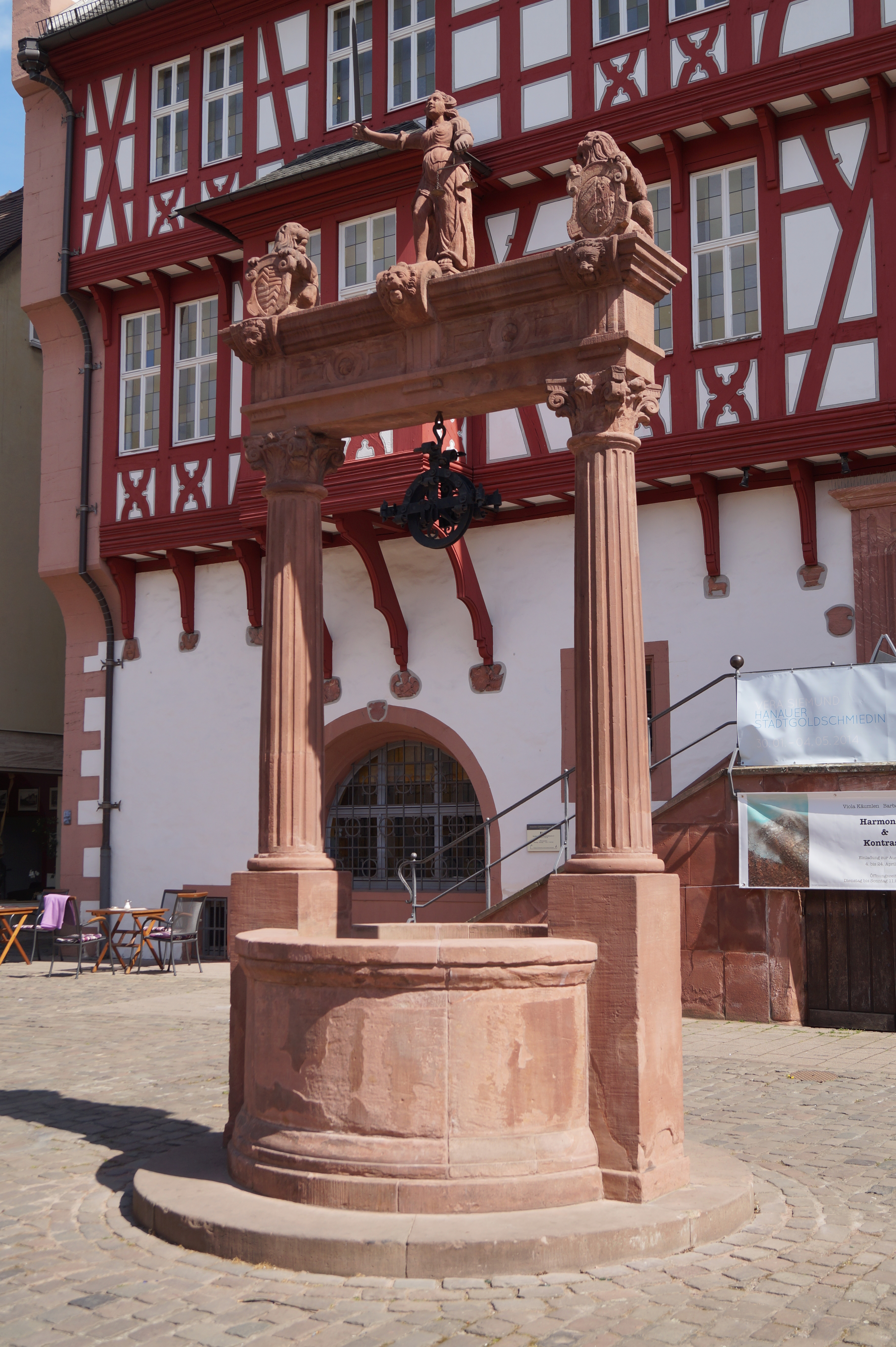 Gerechtigkeitsbrunnen vor dem Altstädter Rathaus in Hanau nach der Renovierung 2013. 1606/1607 geschaffen von dem Bildhauer Johannes Rab aus Büdingen.